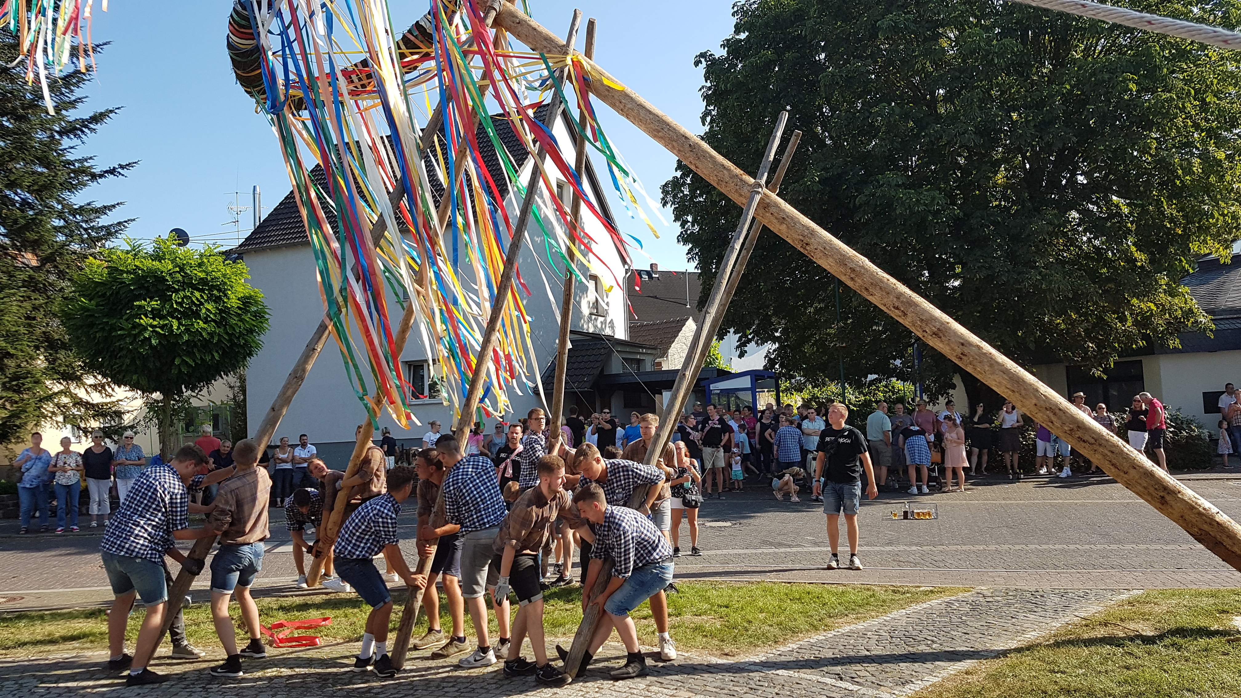 Traditionelles Aufstellen des Kirmesbaumes in Beselich-Obertiefenbach am 31. August 2019